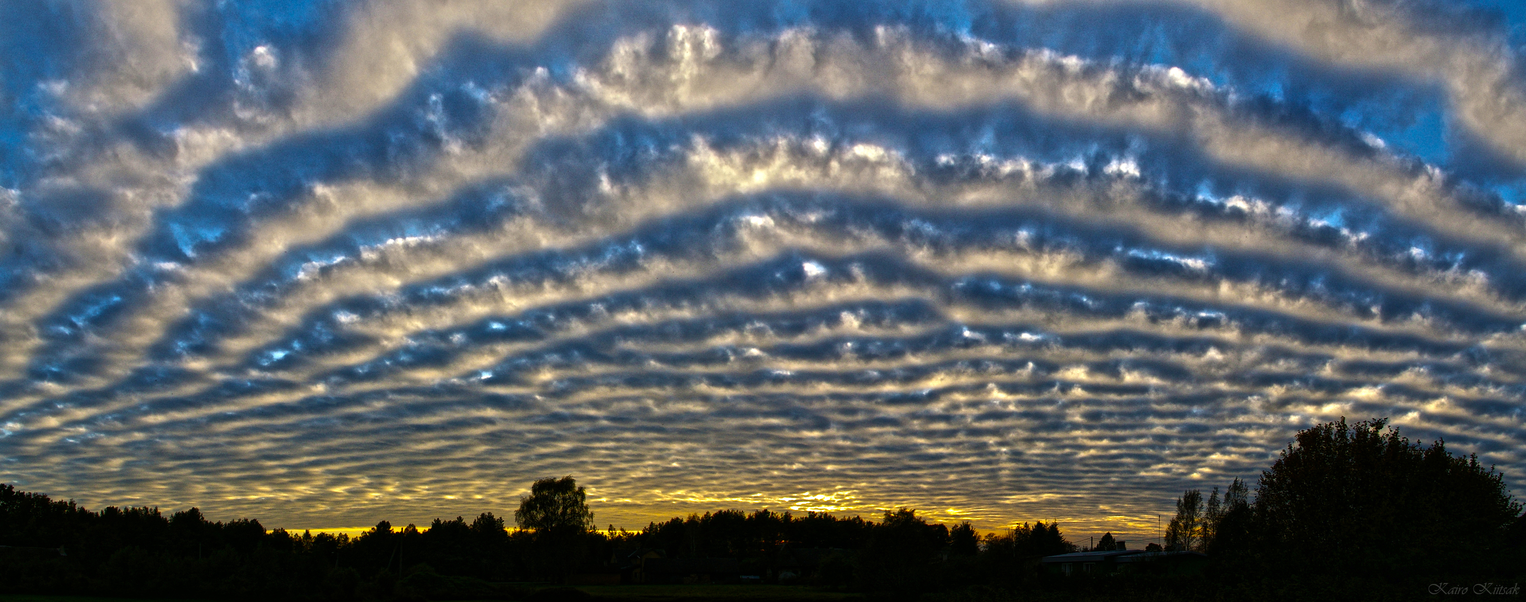 Foto on jäädvustatud Lääne-Virumaal Simunas 3.10.2014.